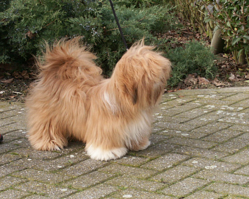 Lhasa Apso EL Minja's Mimi